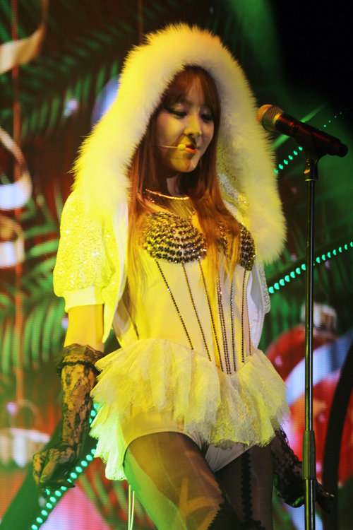 攝於2012/12/24首爾Tonight 37.2℃演唱會